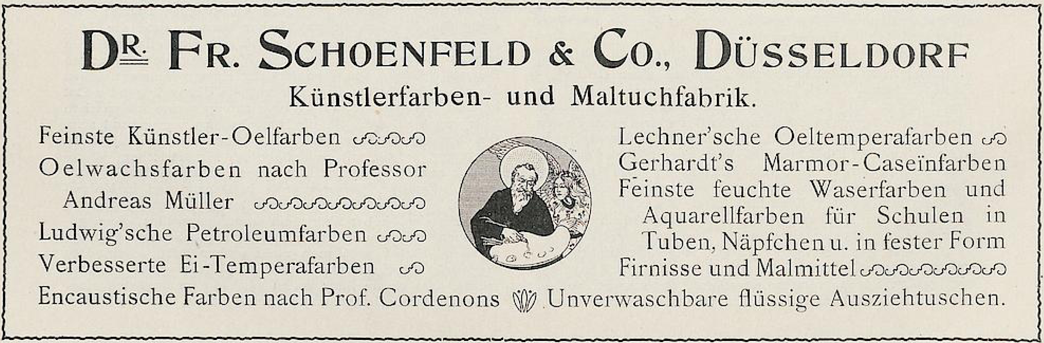 Anzeige Dr. Franz Schoenfeld Farben in Die Rheinlande Februar, 1901 S.285